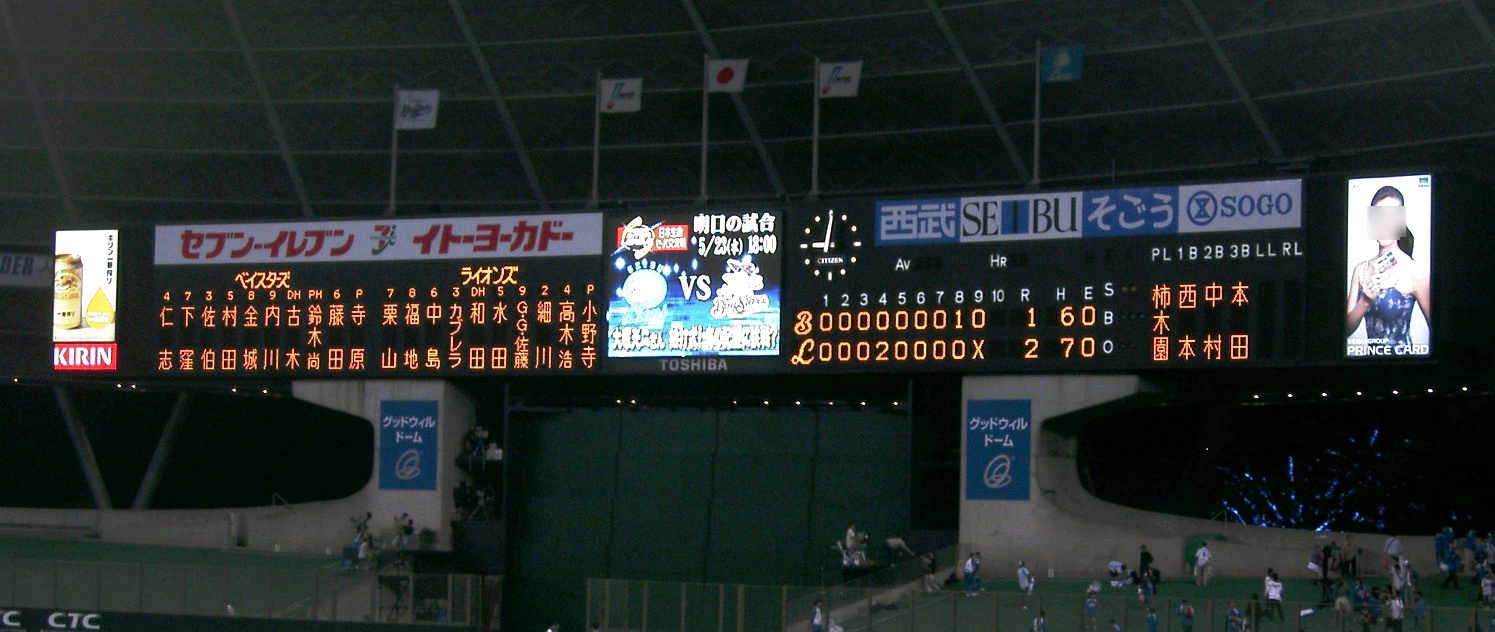 “Seibu Dome” Seibu Lions professional baseball team located in Tokorozawa, Saitama, Japan. “西武ドーム” 日本の埼玉県所沢市にあるドーム式野球場。日本のプロ野球パリーグに加盟する、西武ライオンズのホーム球場でもある。電光スコアボードを撮影。